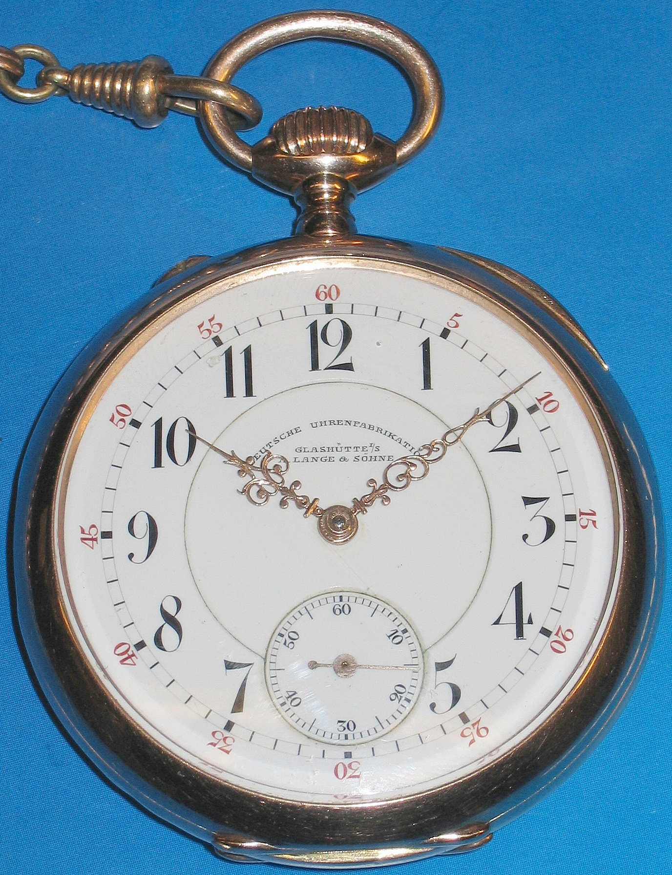 Taschenuhr A.Lange & Söhne, selbst photographiert 2005 Johann H. Addicks Genehmigung: siehe unten